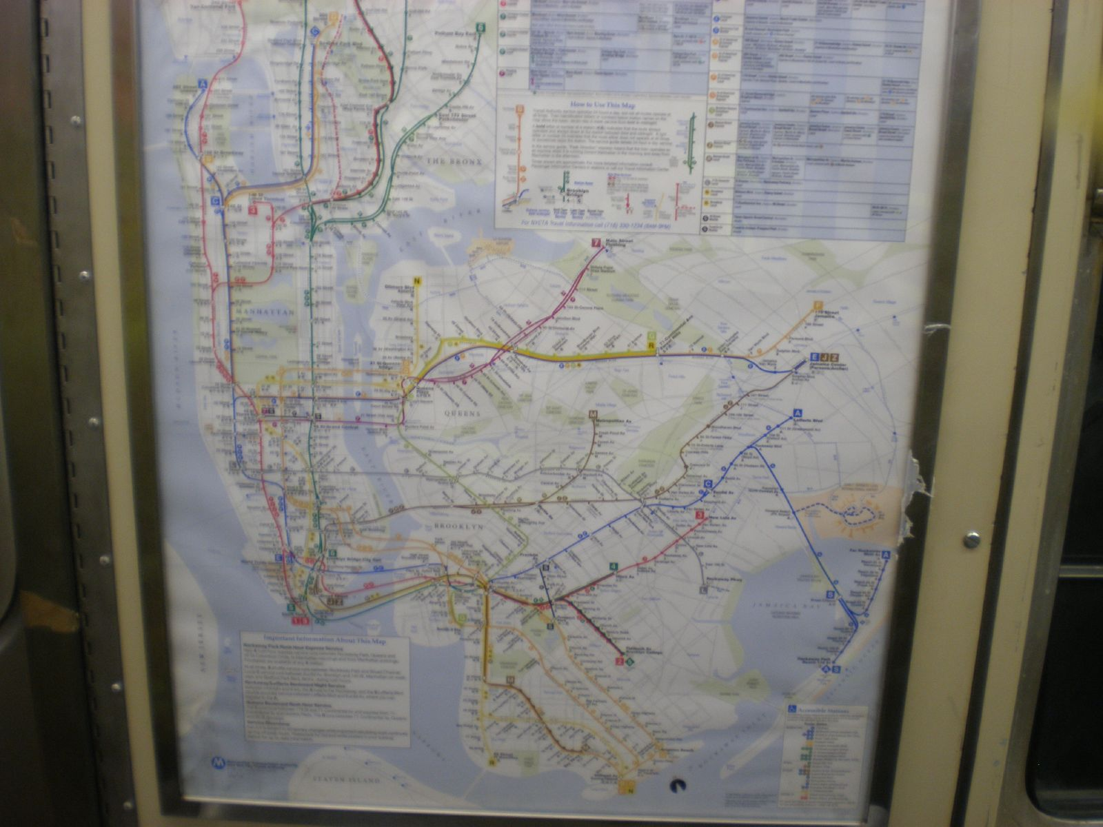 old map